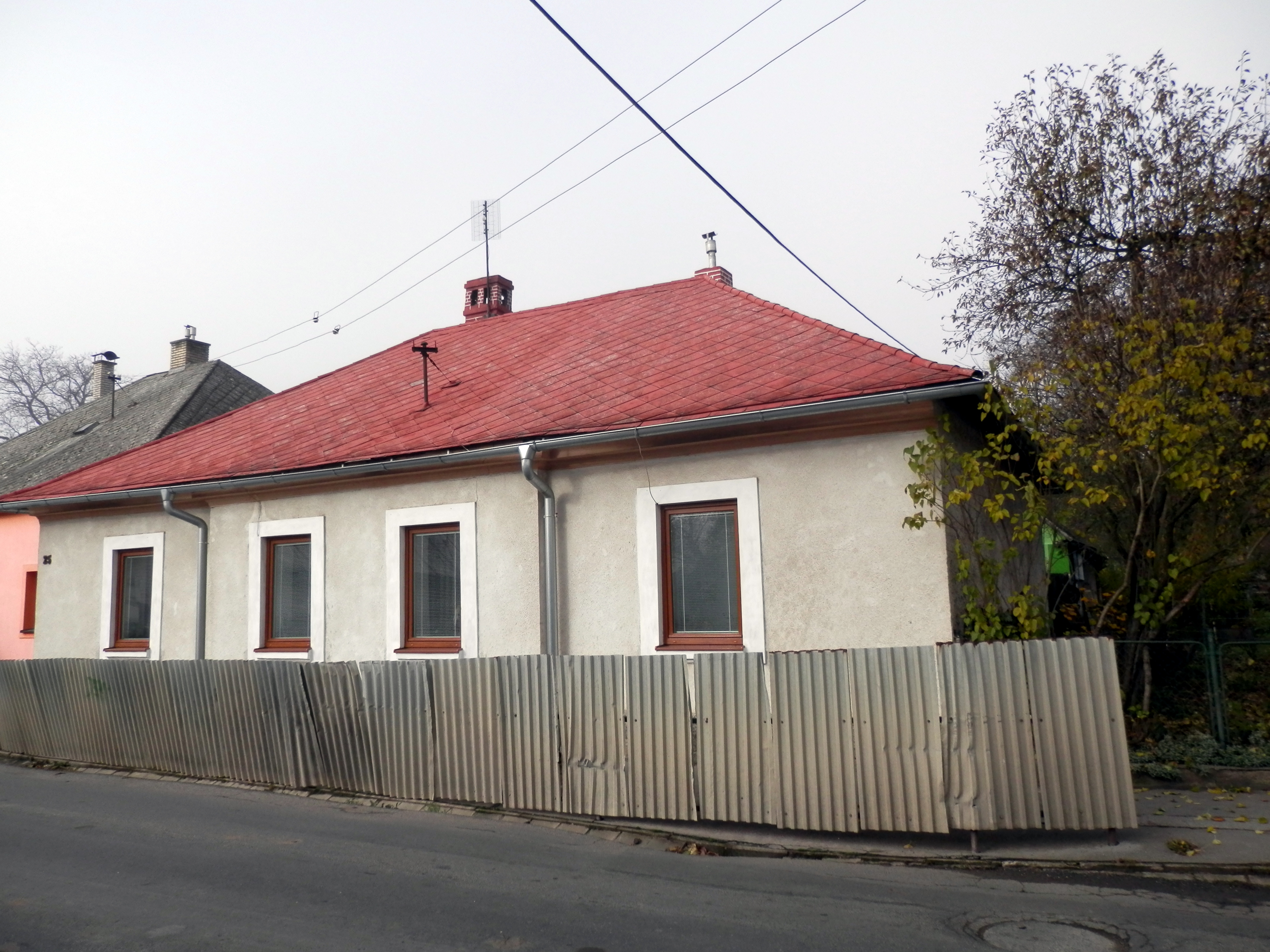 Ulica Soľnobanská 25. Mesto Prešov. Národná kultúrna pamiatka - meštiacky dom.